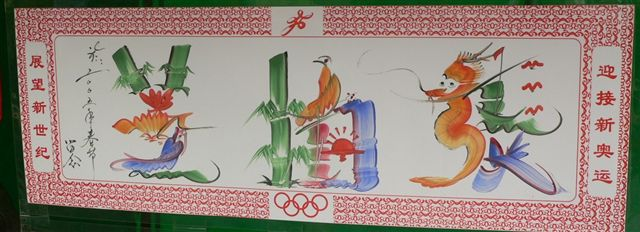 花鸟字作品 2005年2月14日拍摄于白云观庙会